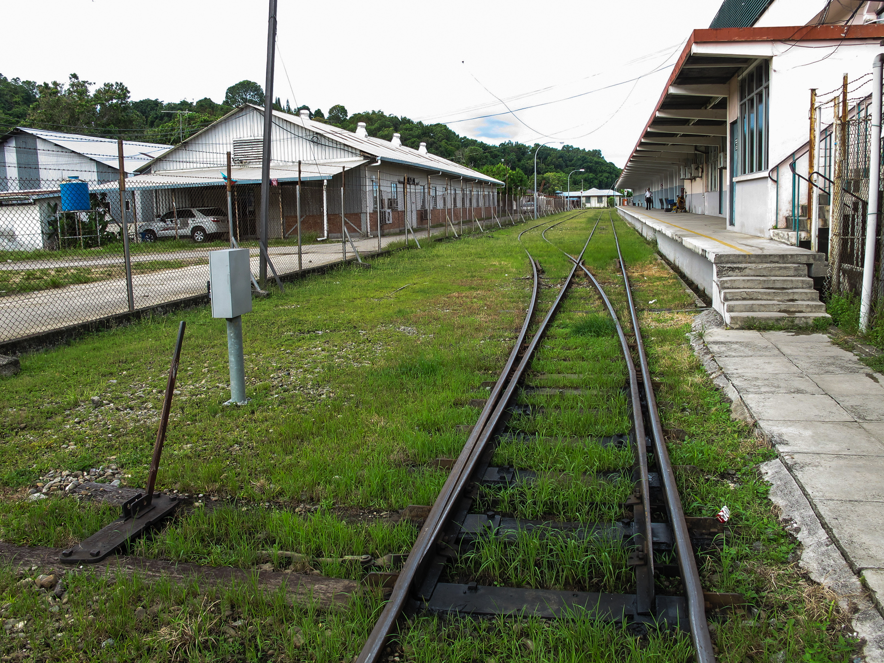 Kota Kinabalu, Sabah: Railway track coming from Kota Kinabalu when entering Stesen Tanjung Aru. At the left side the workshops and the depot